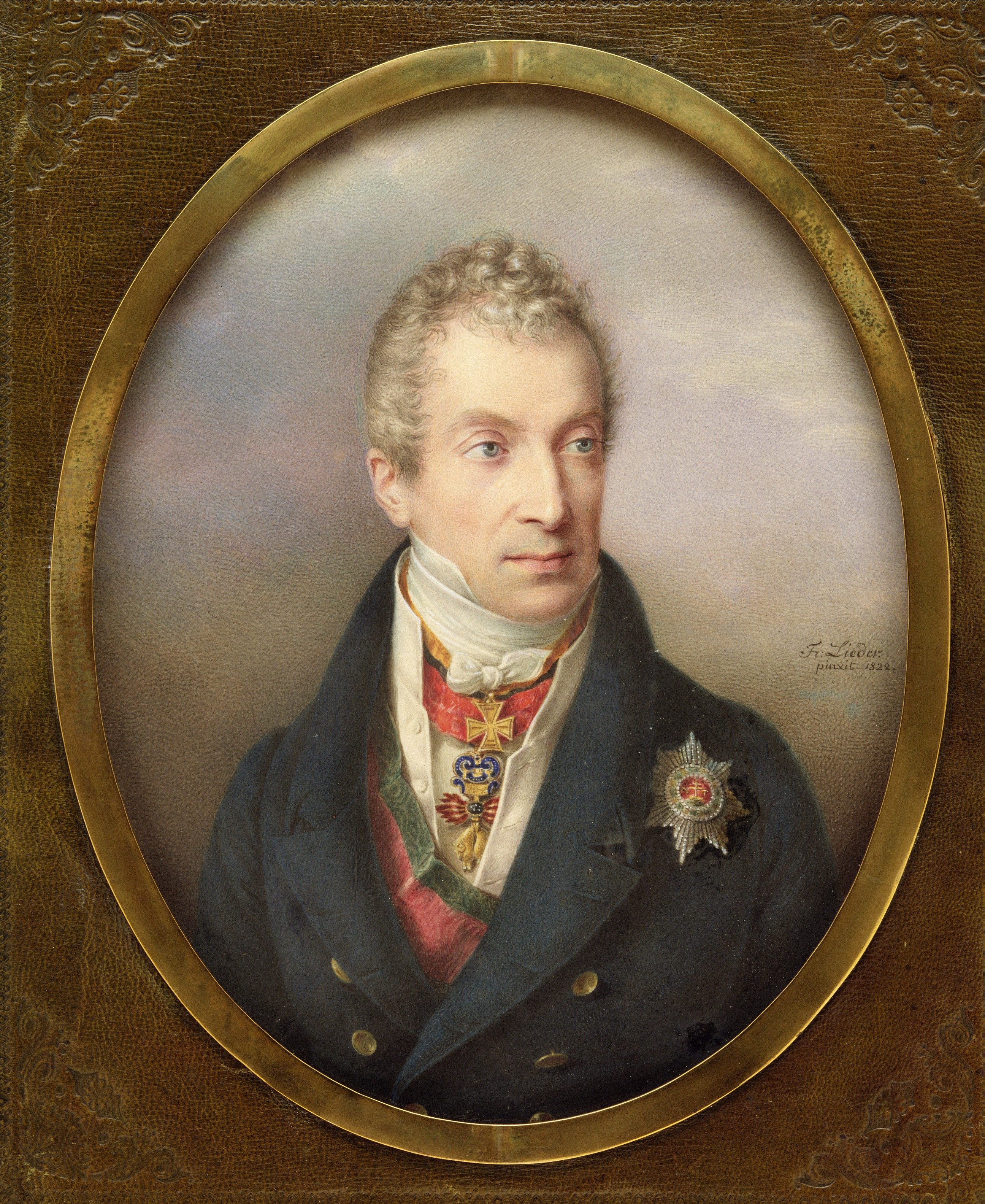 Painting, miniature; Miniatures